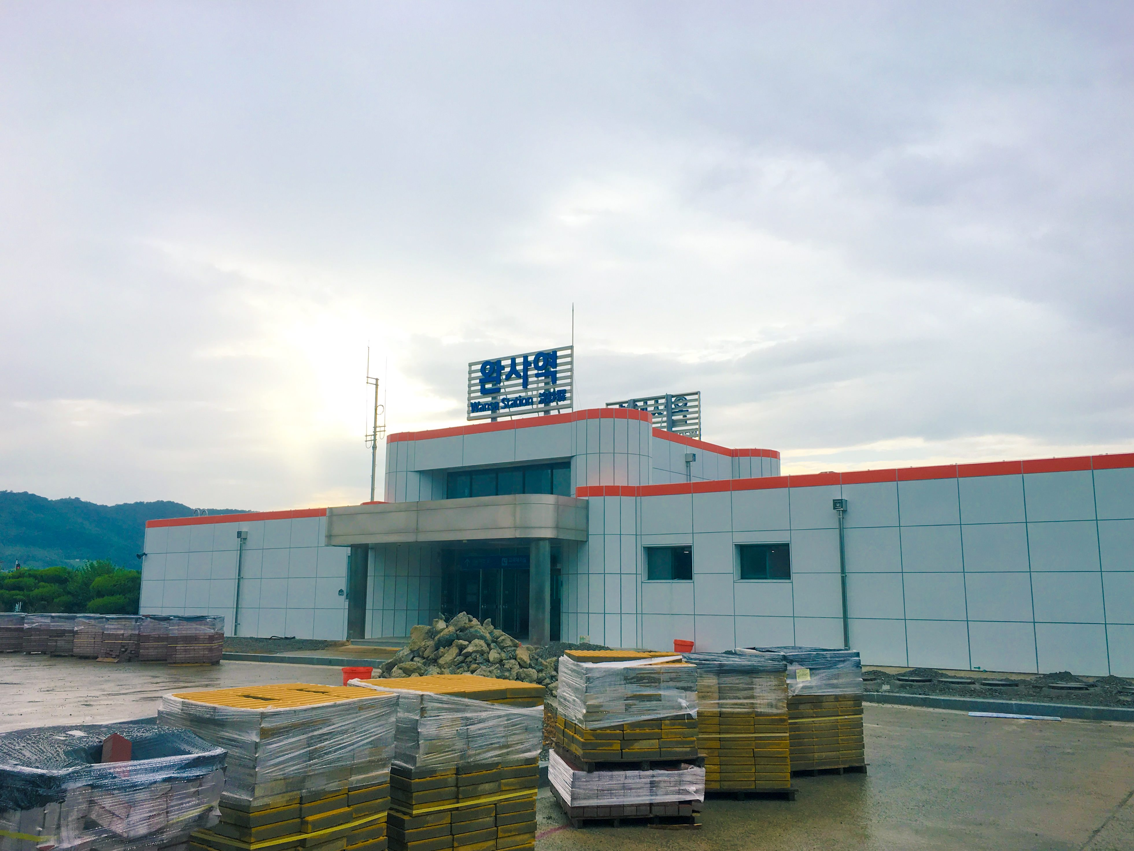 완사역 역사